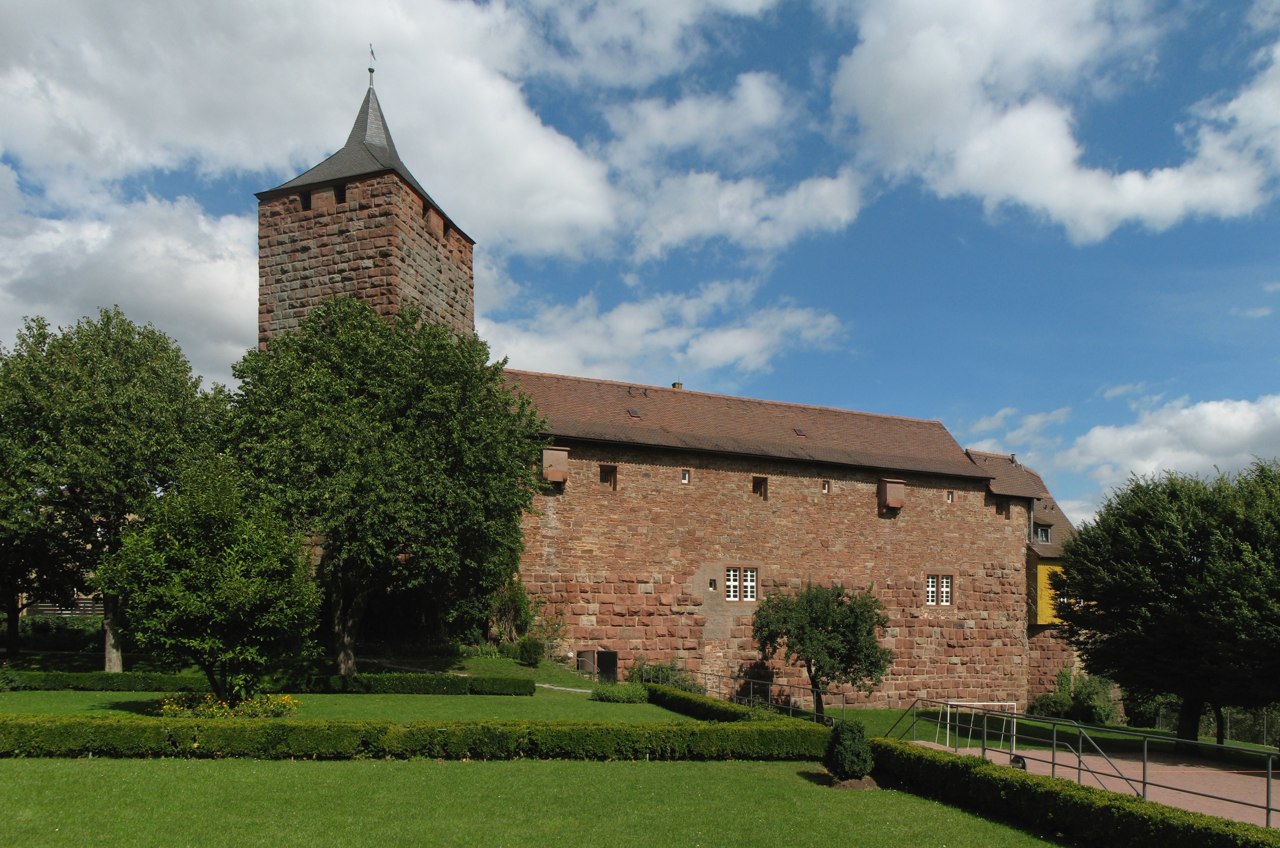 Burg Rothenfels von der Westseite.